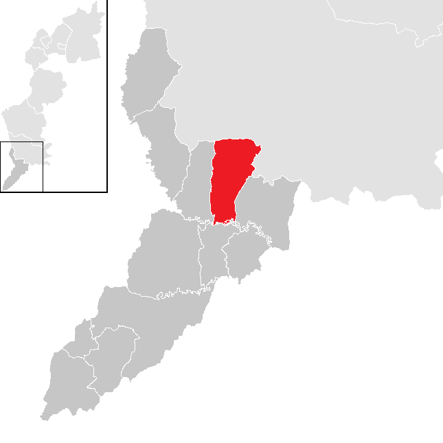 Bezirk Jennersdorf